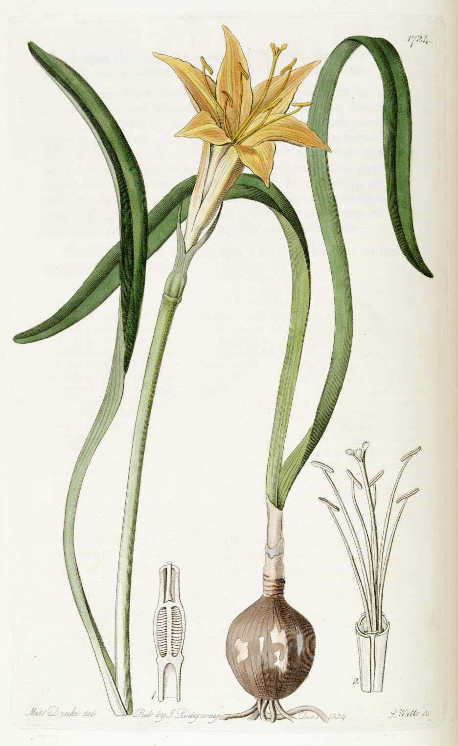 Pyrolirion arvense